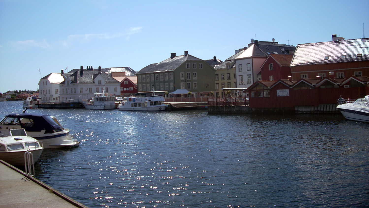 Tyholmen Arendal sett fra Langbryggen